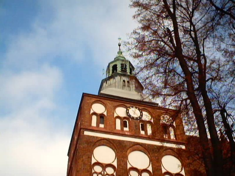 La bildo estas kopiita de pl. La originala priskribo estas: Summary Gotycki Kościół Mariacki PW. Wniebowzięcia Licensing Autor: mychaus {